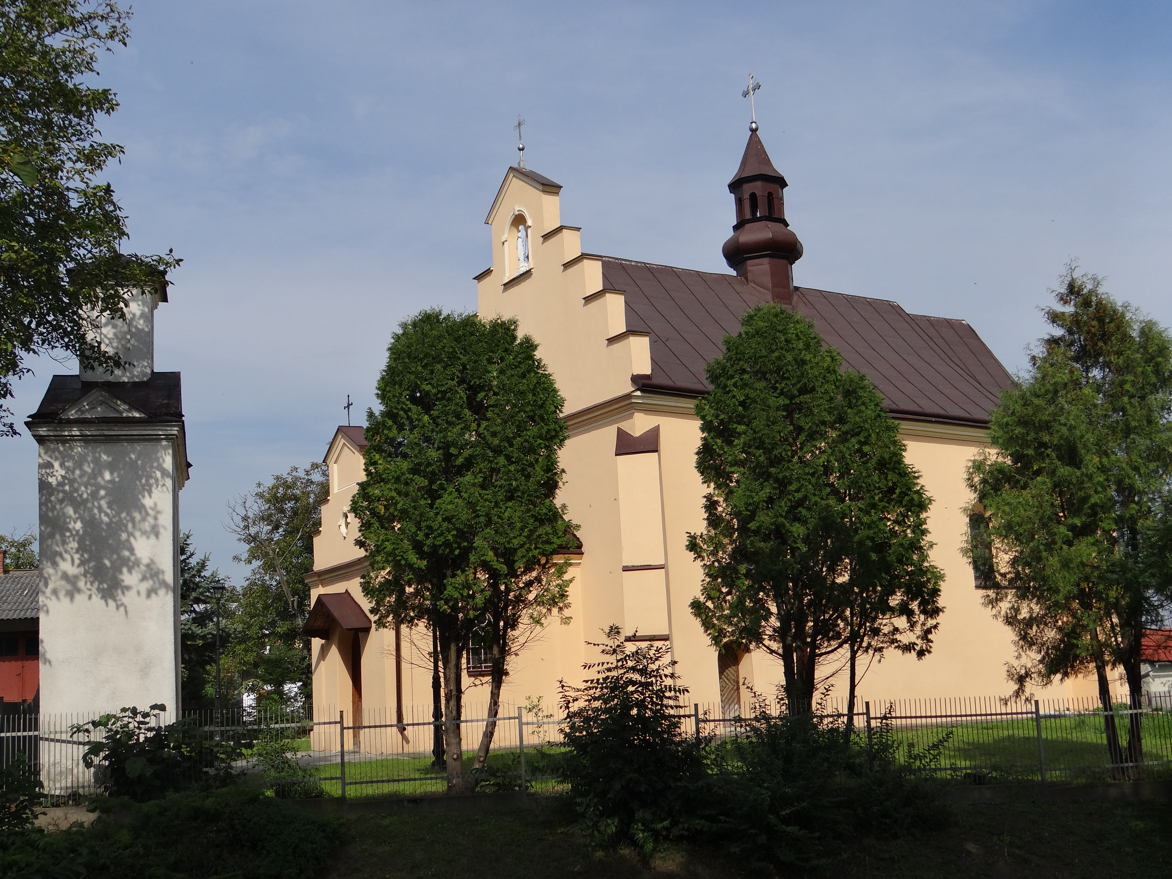 Kańczuga, zespół cerkwi greko-kat. p.w. Opieki NMP, ob. kościoła fil. p.w. Matki Boskiej Ła…, XVII-XVIII - 1909